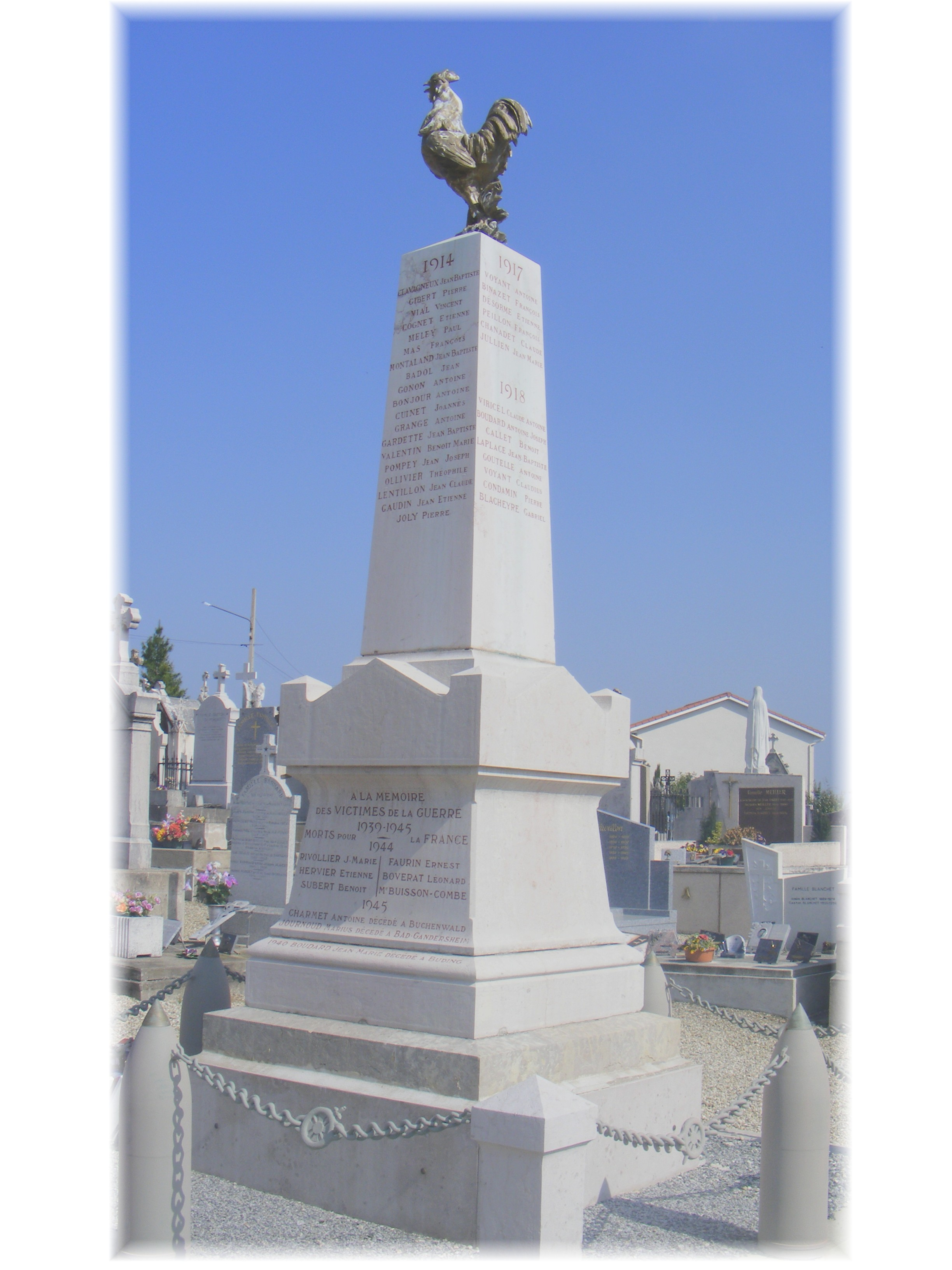 Monument aux morts édifié en 1919 au centre du cimetière